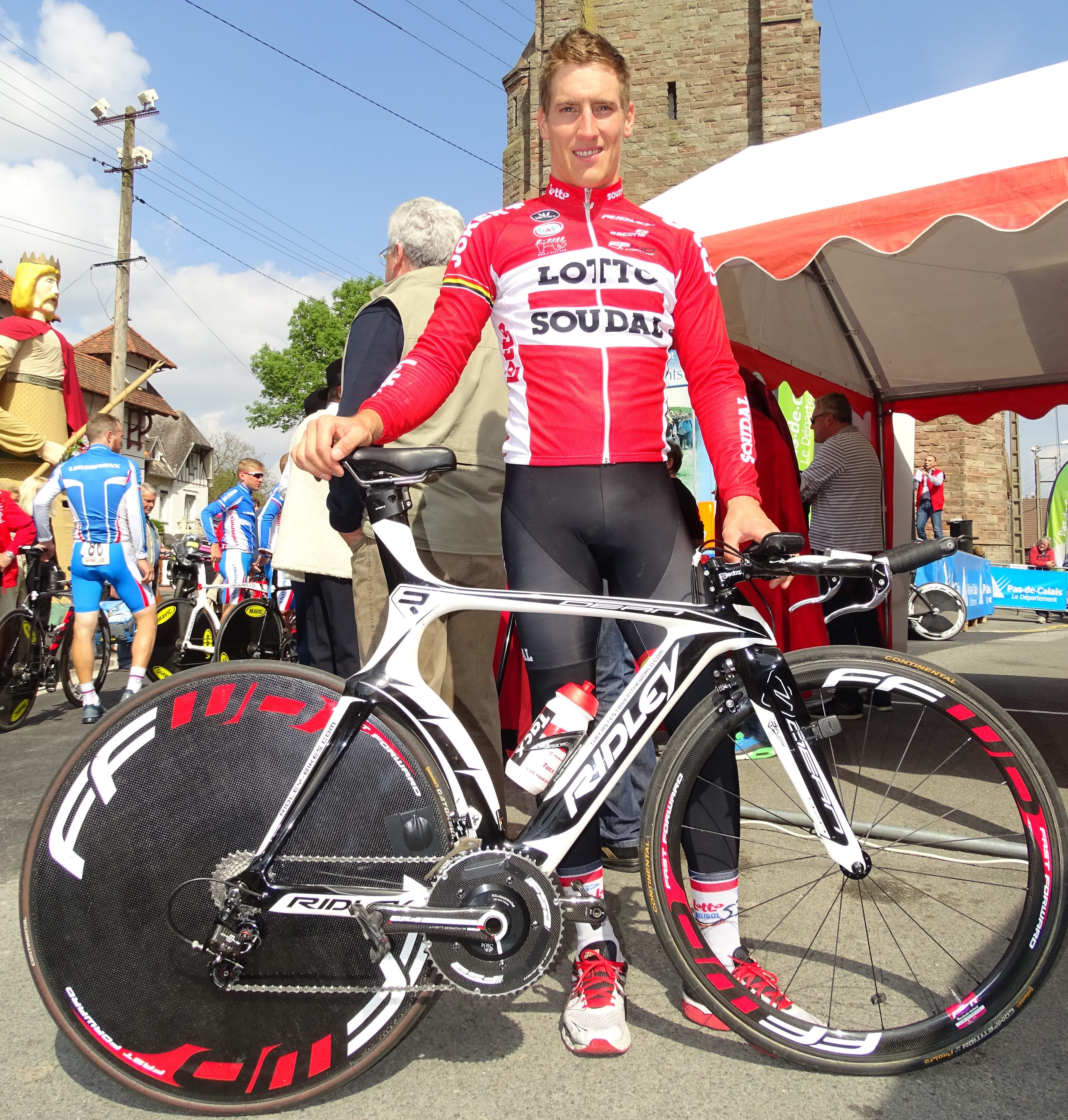 Reportage réalisé le vendredi 22 mai 2015 à l'occasion du départ du contre-la-montre par équipes de la première étape du Paris-Arras Tour 2015 à Vitry-en-Artois, Pas-de-Calais, Nord-Pas-de-Calais, France. Depicted person: Maarten Craeghs Depicted team: Lotto-Soudal U23